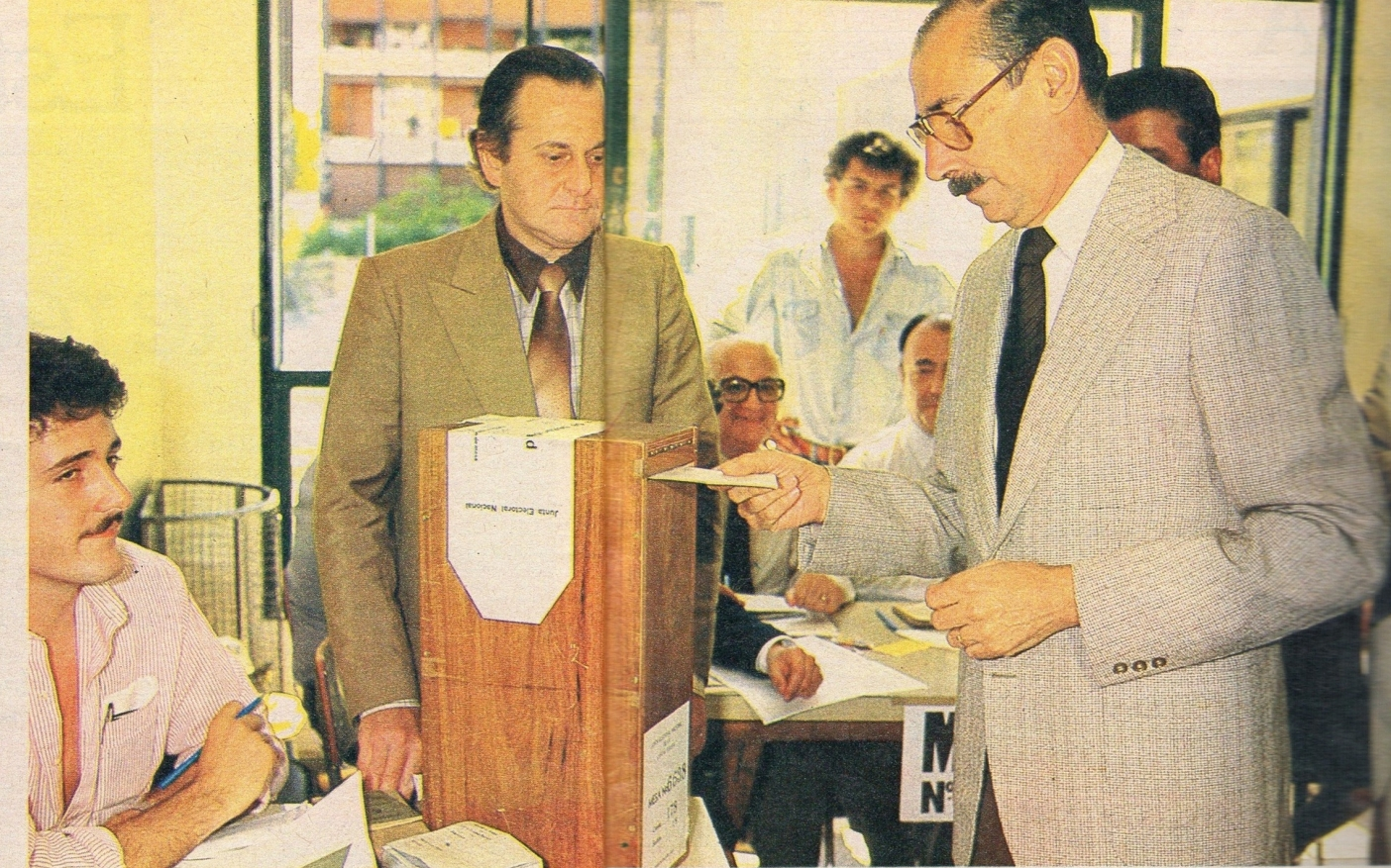 El dictador Jorge Rafael Videla, presidente de facto de Argentina entre 1976-1981, vota en las elecciones presidenciales de 1983, que marcaron la restauración definitiva de la democracia en su país después de la dictadura iniciada por él.